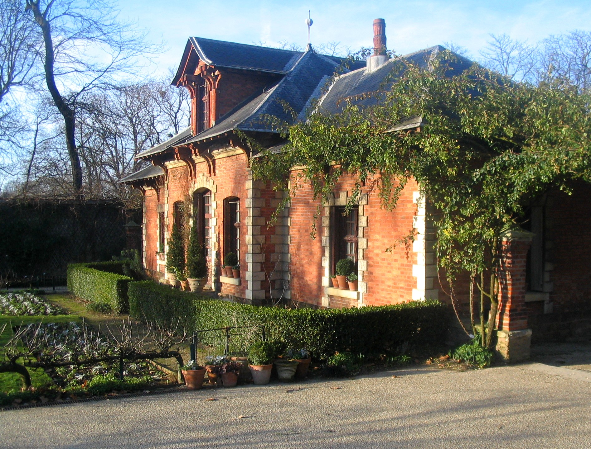 Pavillon du potager de Bagatelle, Paris, France